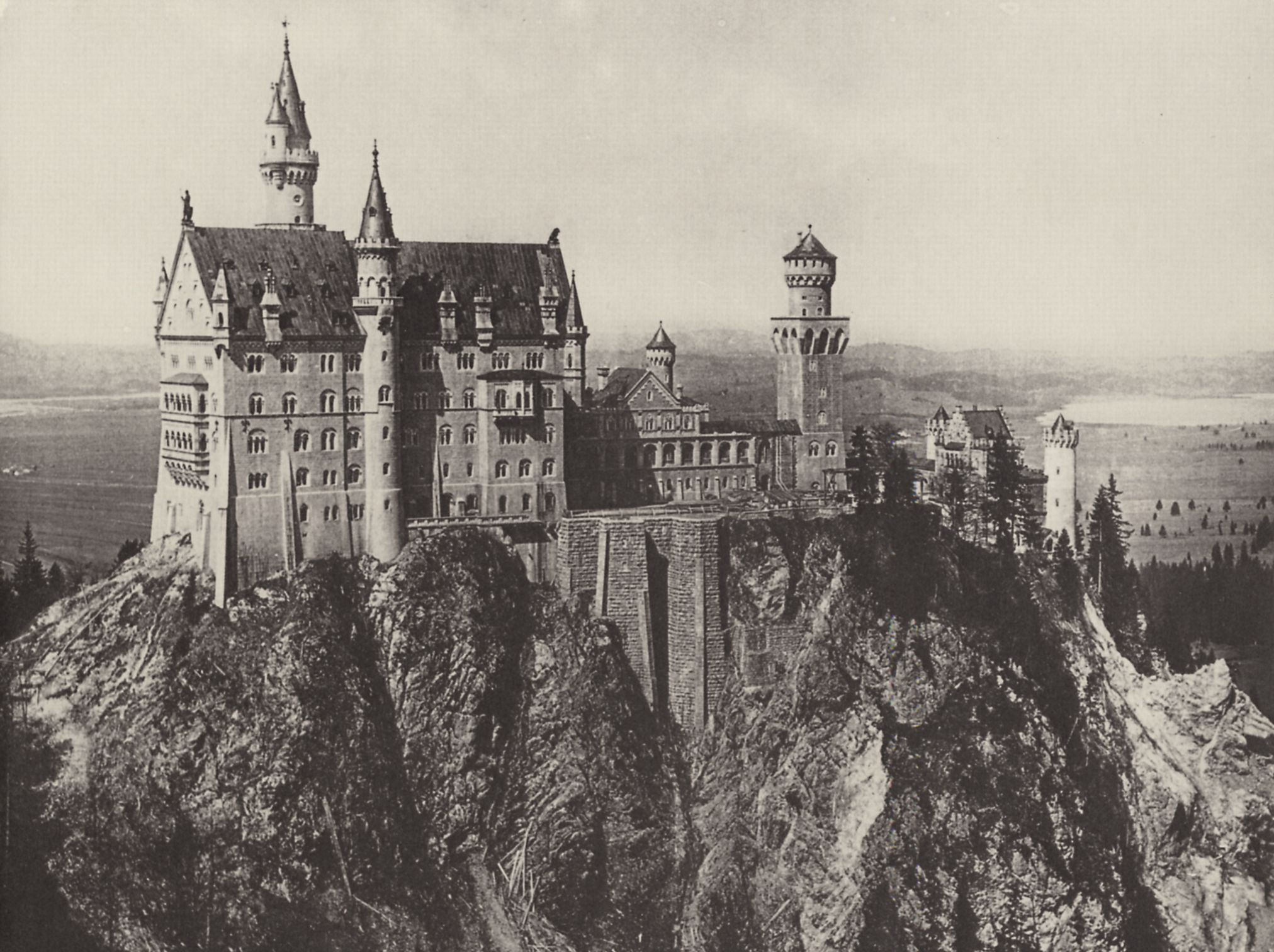 Bayerische Königsschlösser, Neuschwanstein – Schloss nach vorläufiger Einrichtung für den Publikumsbesuch